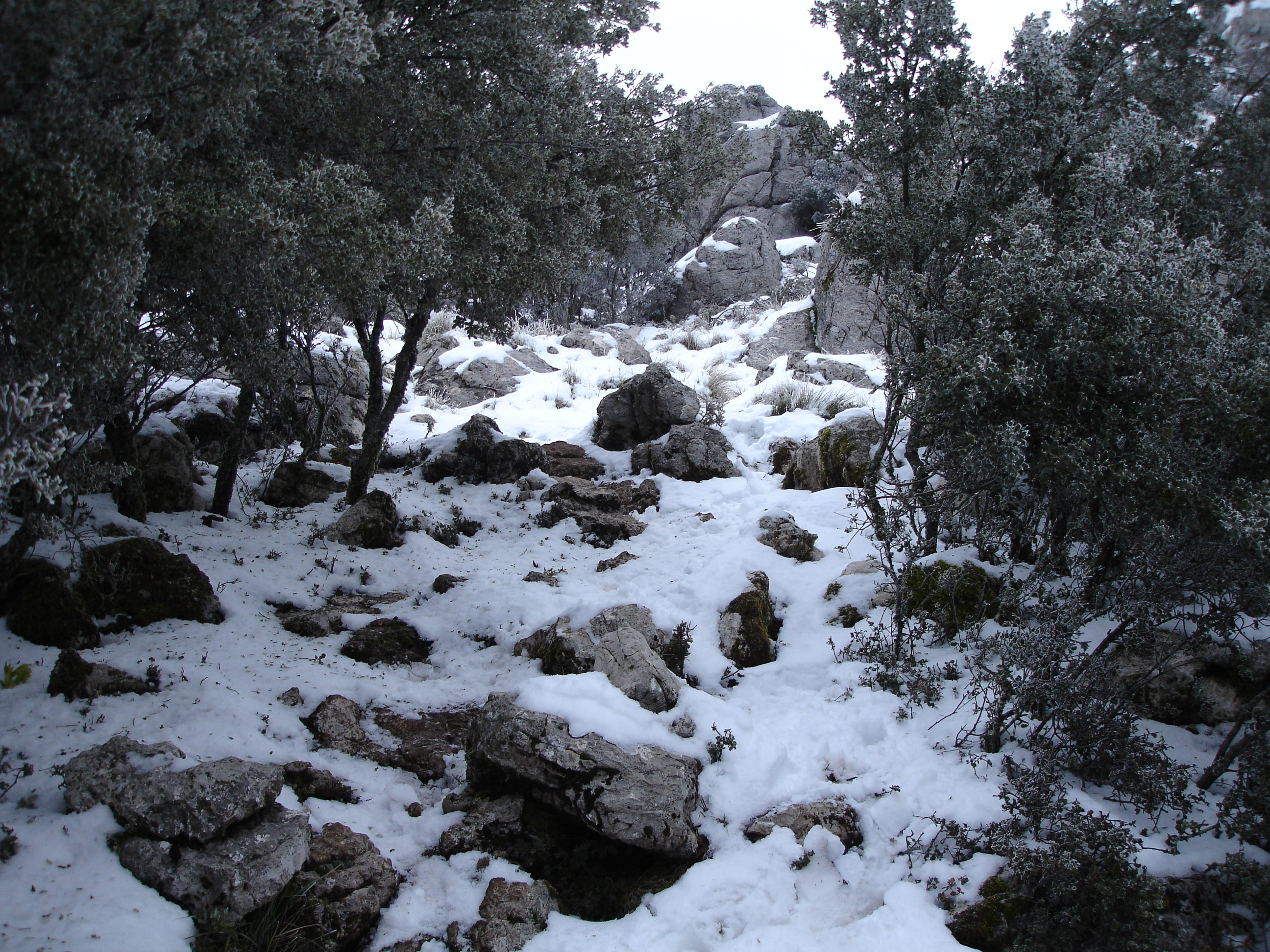 Subida al Pico del Torreón, Sierra de Grazalema